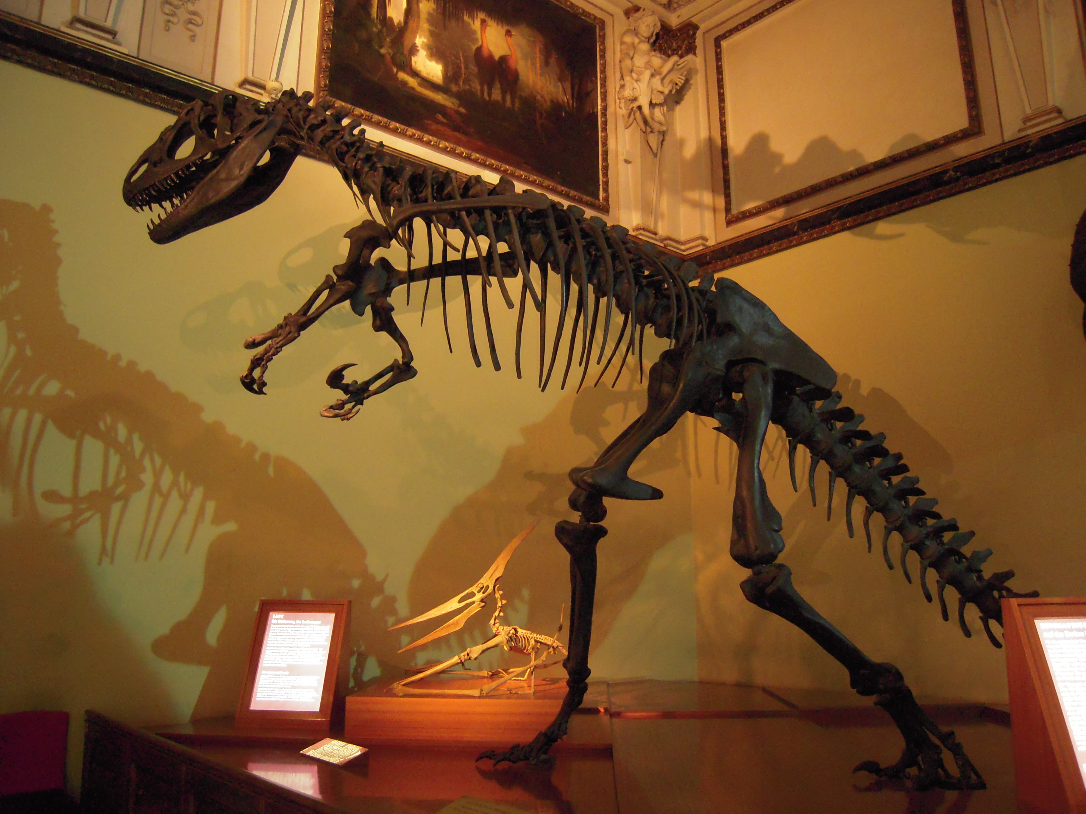 Skelettrekonstruktion von Allosaurus fragilis im Naturhistorischen Museum Wien